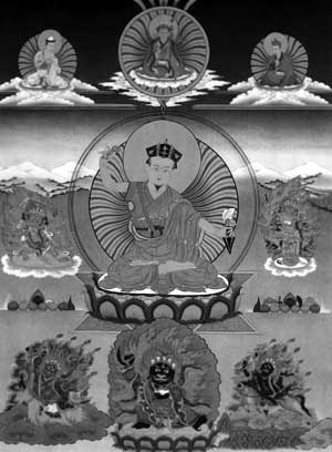 Der 2. Karmapa Karma Pakshi (Wandmalerei in einem Kloster in Osttibet)